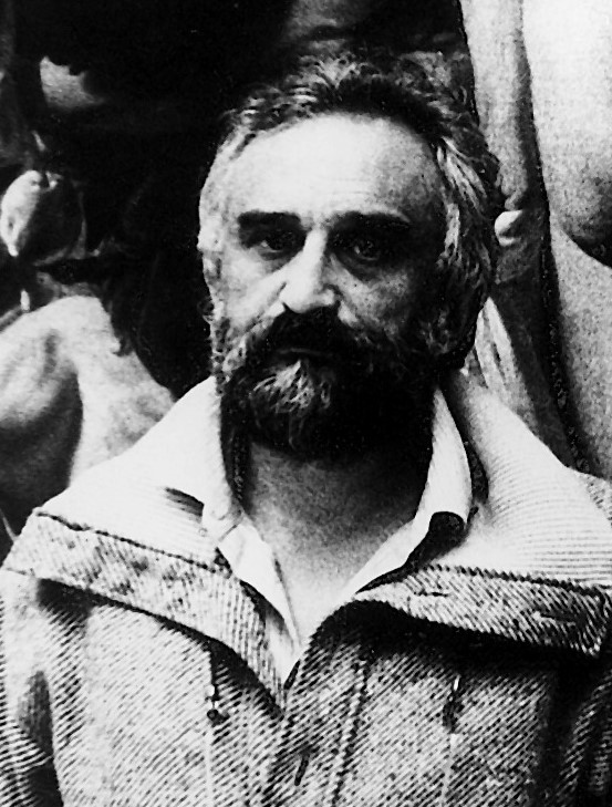 pintor y escultor español